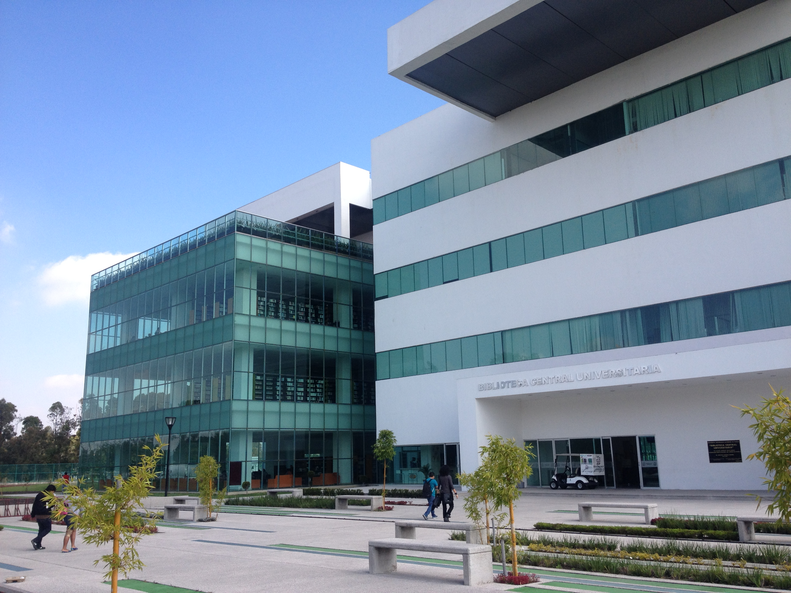 Fachada de la Biblioteca Central de la Benemérita Universidad Autónoma de Puebla (BUAP). Ciudad Universitaria, Puebla, Puebla.